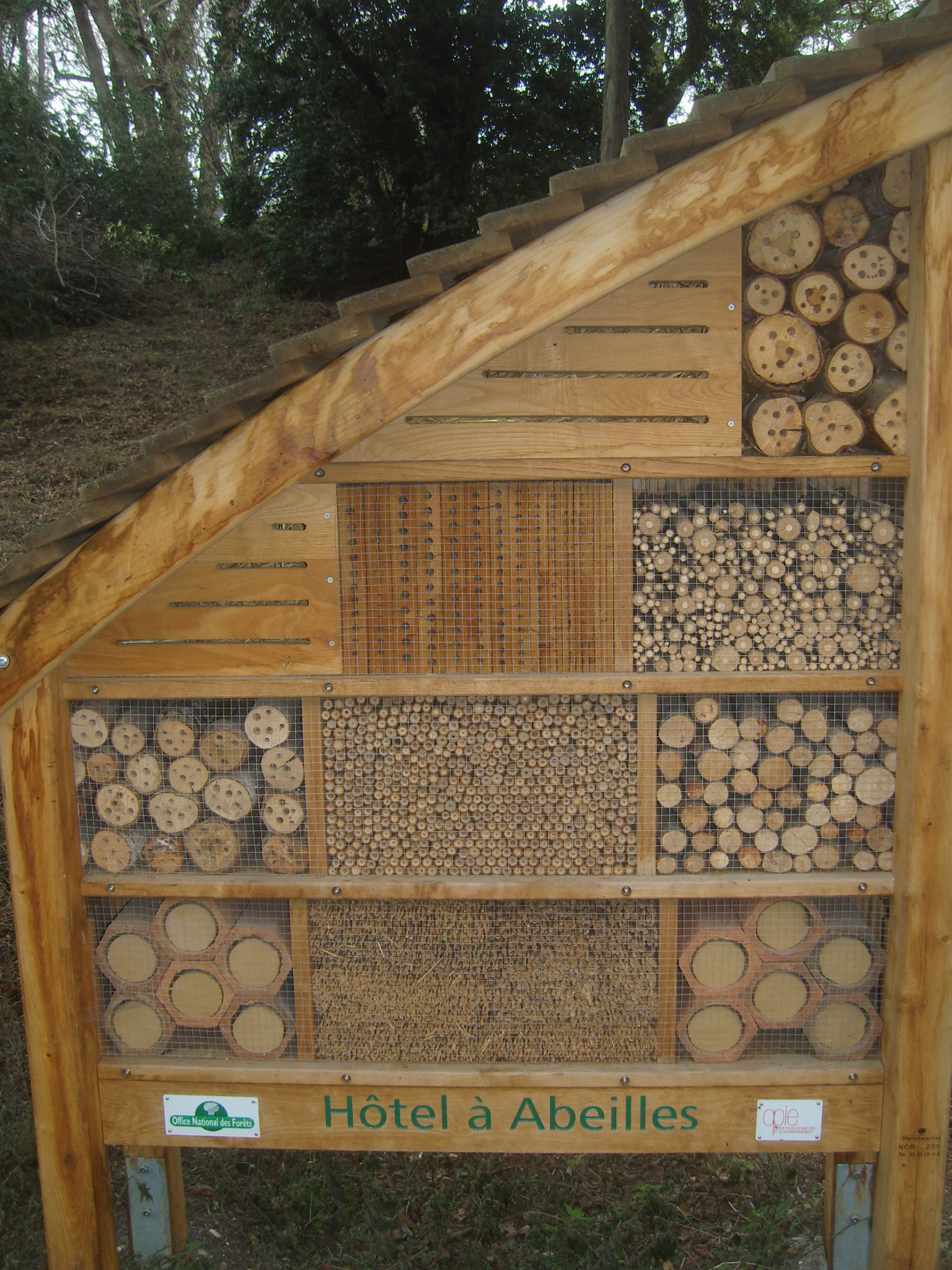 Paris 5e arrondissement - Jardin des plantes - Hôtel à abeilles, vue de face